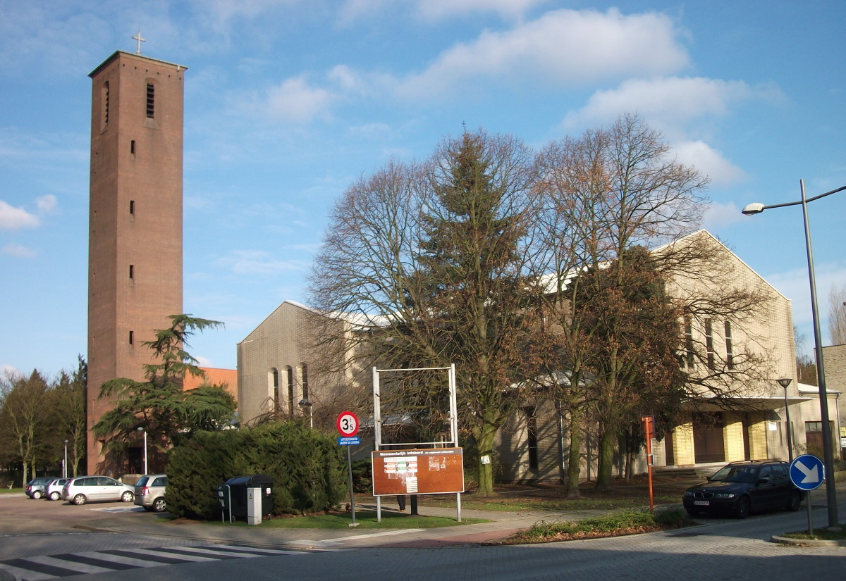 Heilig Hart kerk - Schoten (wijk Deuzeld) Belgie